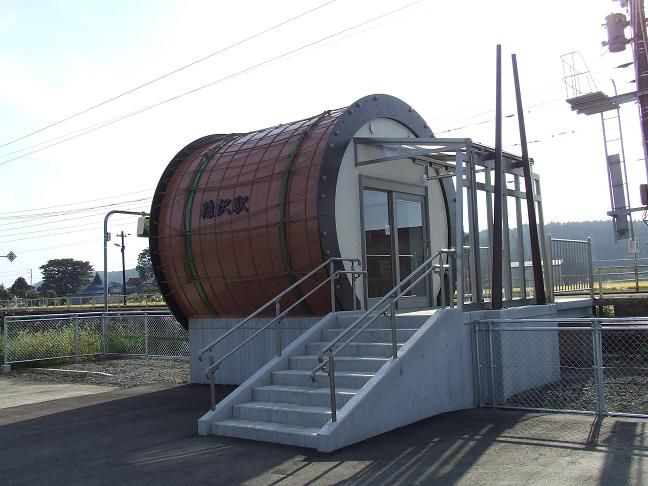 JR糠沢駅2009年7月竣工の新駅舎